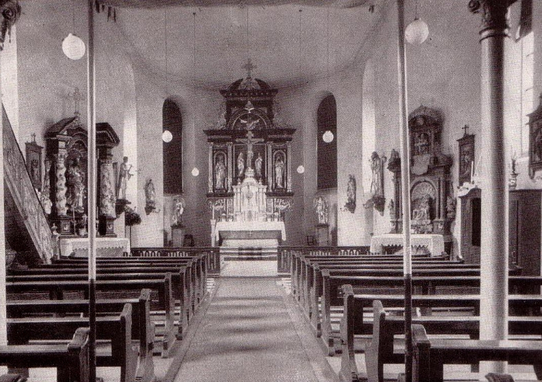 Erste Kirche von 1792, Altar neu 1882